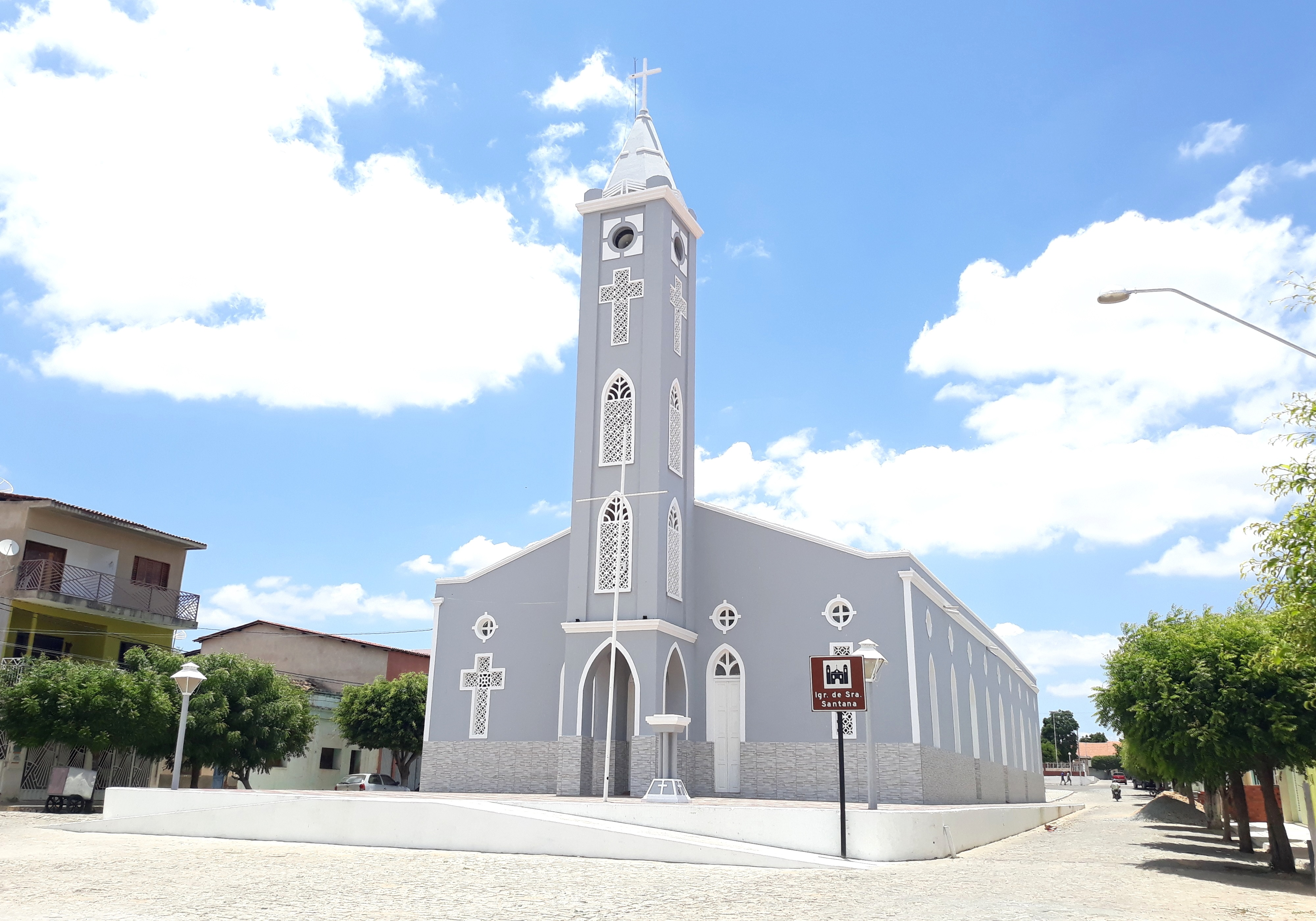 Igreja Matriz de Senhora Santana, padroeira de Luís Gomes, no Rio Grande do Norte (Brasil), que faz parte da Diocese de Santa Luzia de Mossoró